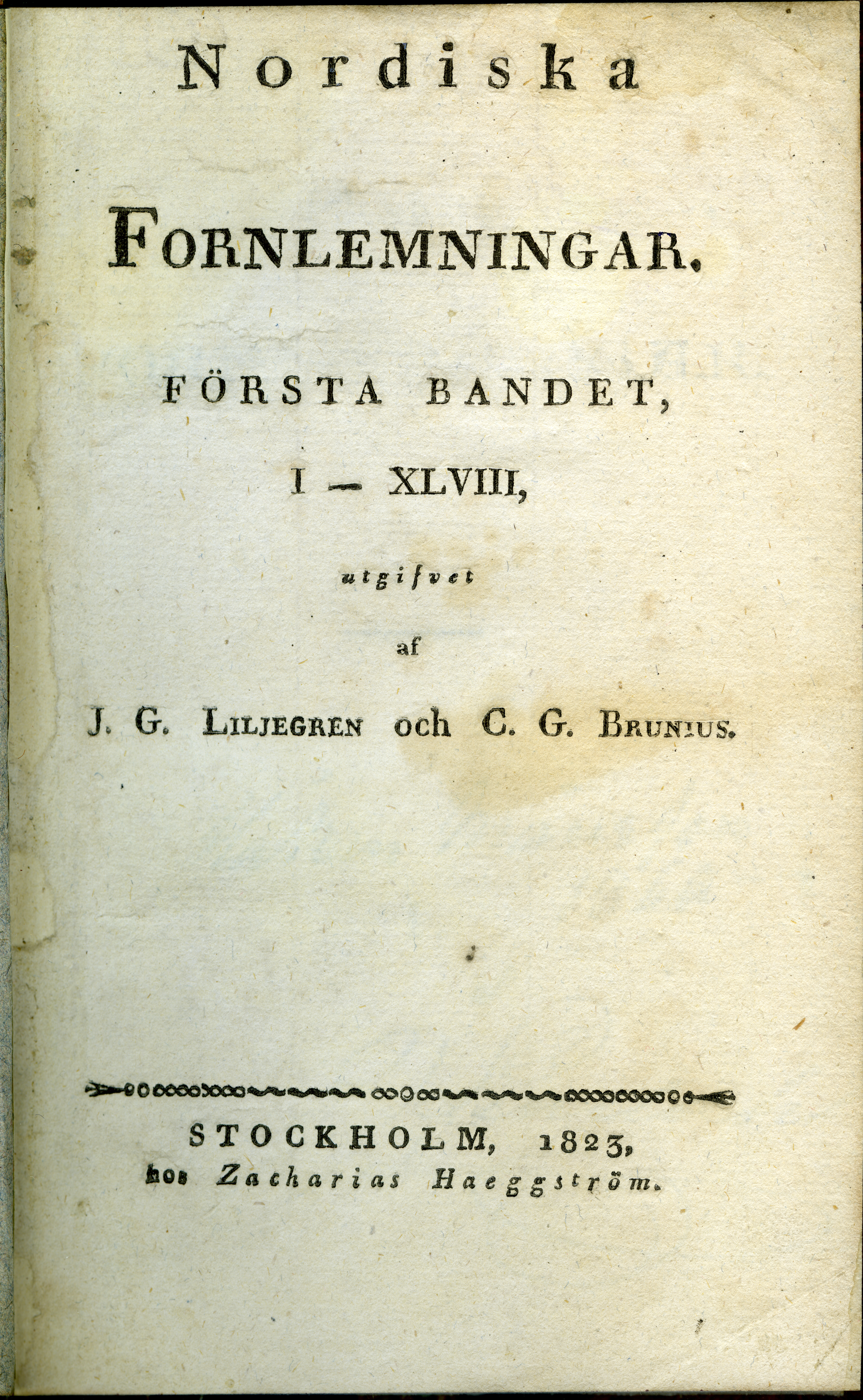 Titelbladet till Nordiska fornlemningar Första bandet I-XLVIII (1823) av Johan Gustaf Liljegren och Carl Georg Brunius tryckt 1823 i Stockholm hos Zacharias Haeggström.